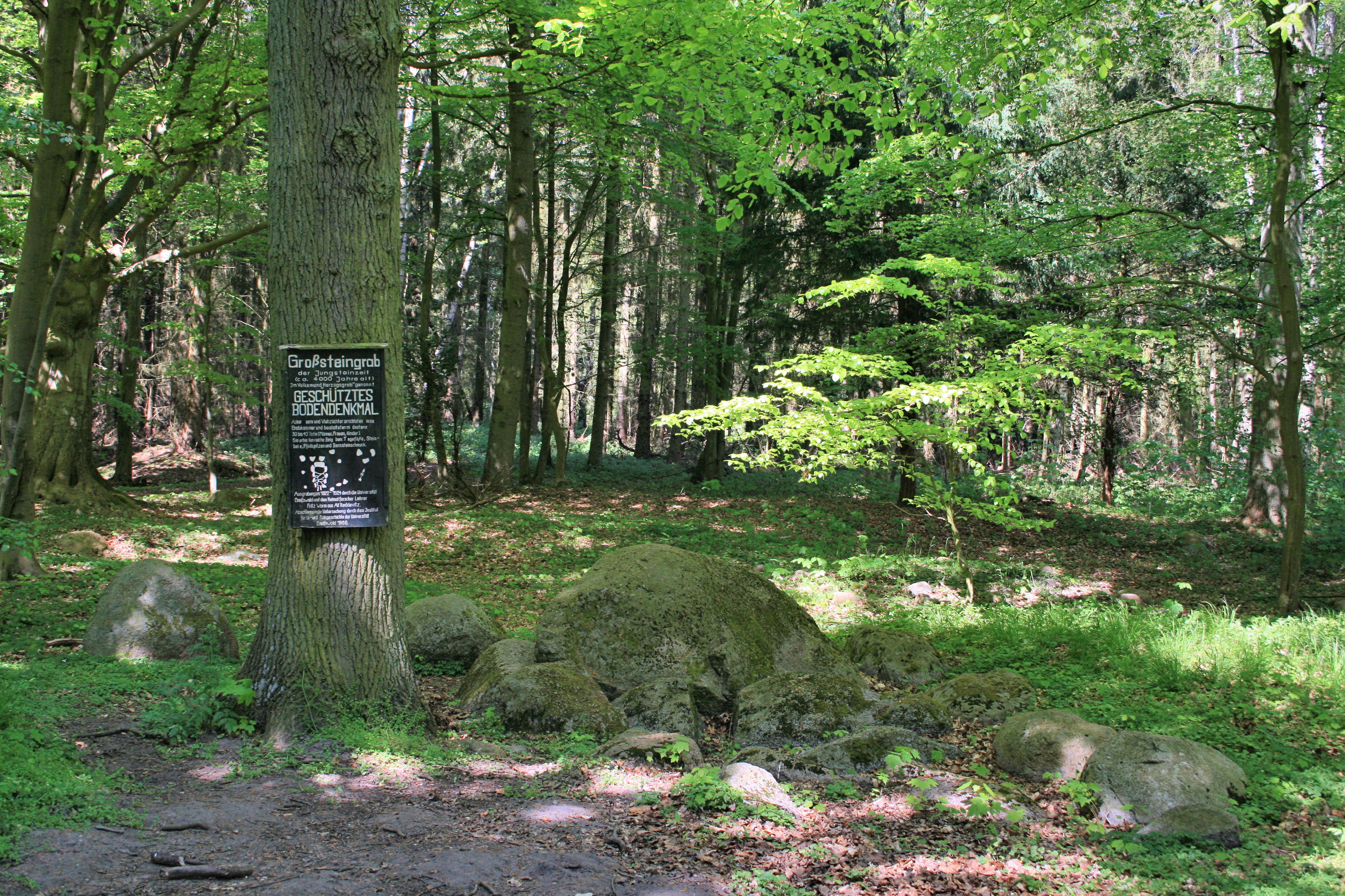 Großsteingrab Alt Reddewitz, bzw. „Herzogsgrab“ im Mönchguter Forst auf der Ostseeinsel Rügen (nach Sprockhoff: Nr. 509[1]).